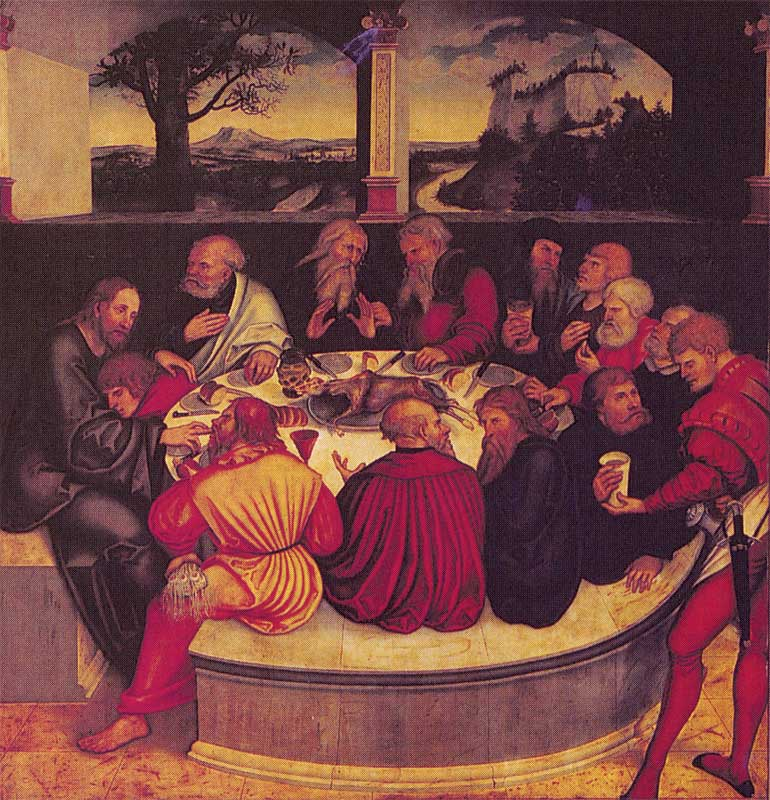 Reformation altarpiece, Stadt- und Pfarrkirche St. Marien zu Wittenberg, central panel